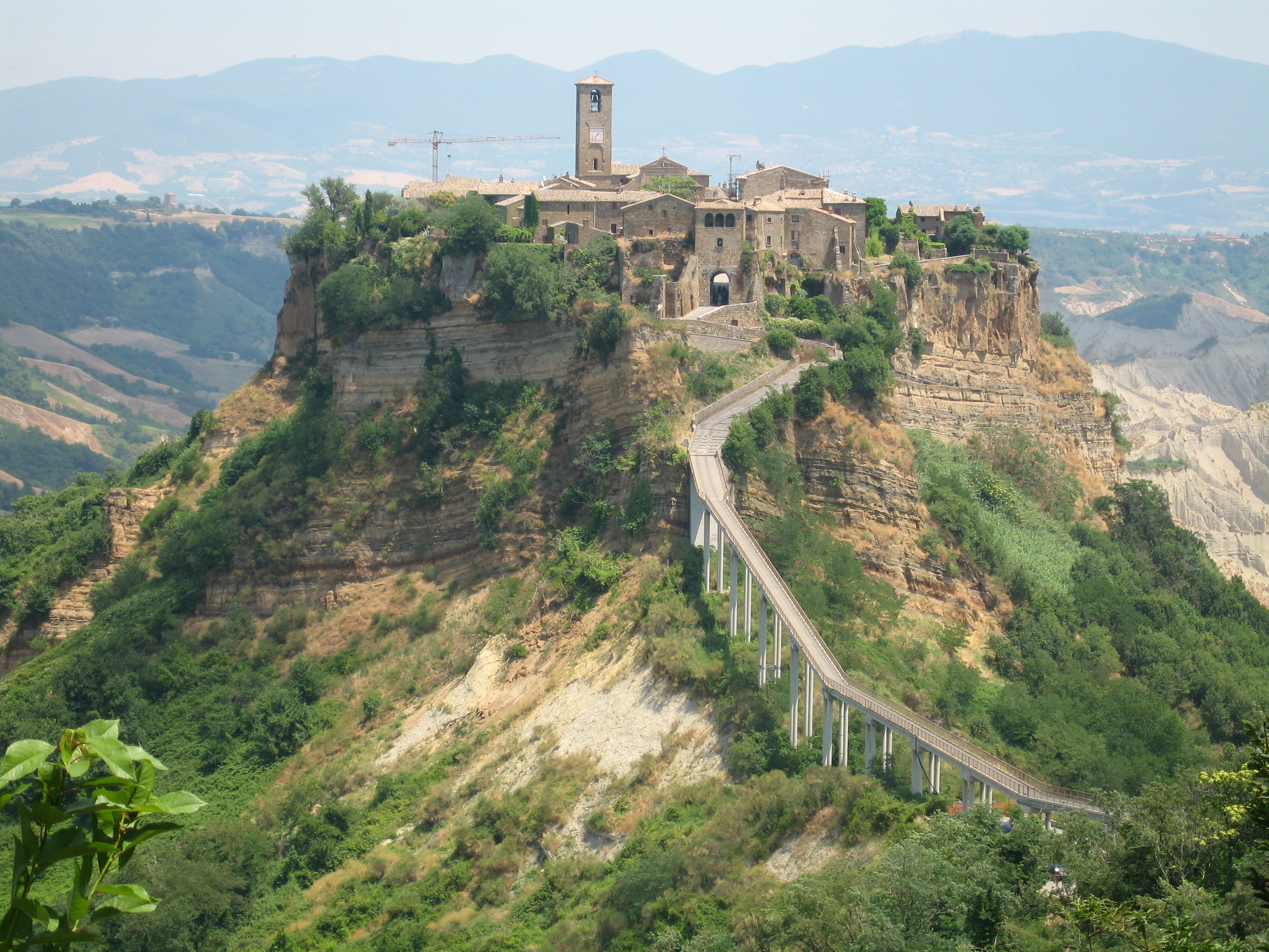 Blick auf Civita di Bagnoregio, nördliches Latium, Italien